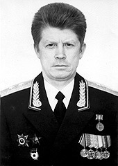 Виктор Степанович Чечеватов (род. 1945) — советский и российский военачальник